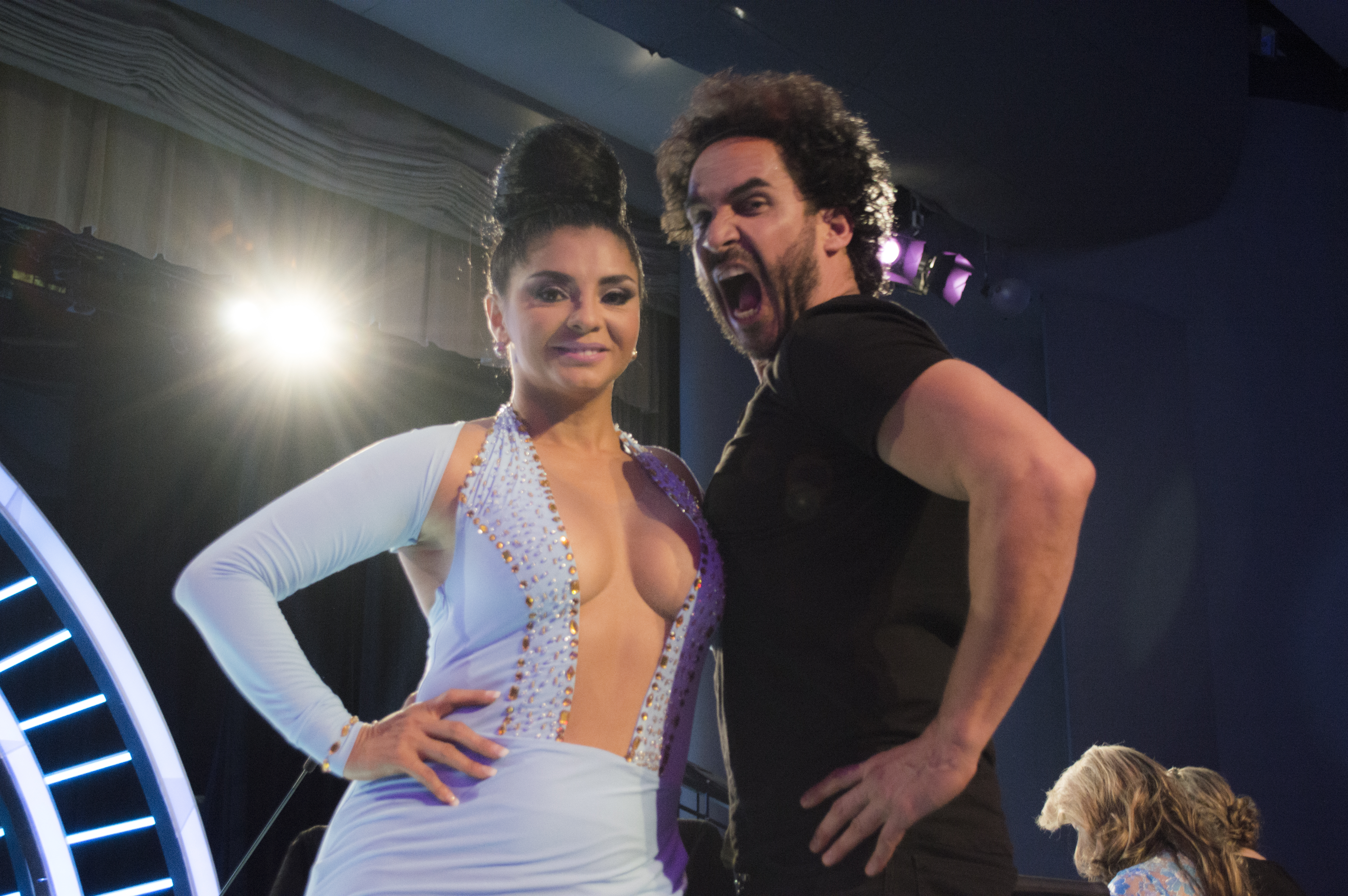 Paola Farías y Fabrizzio Ferreti como jurados de Ecuador Tiene Talento 3 el 26 de octubre de 2014.